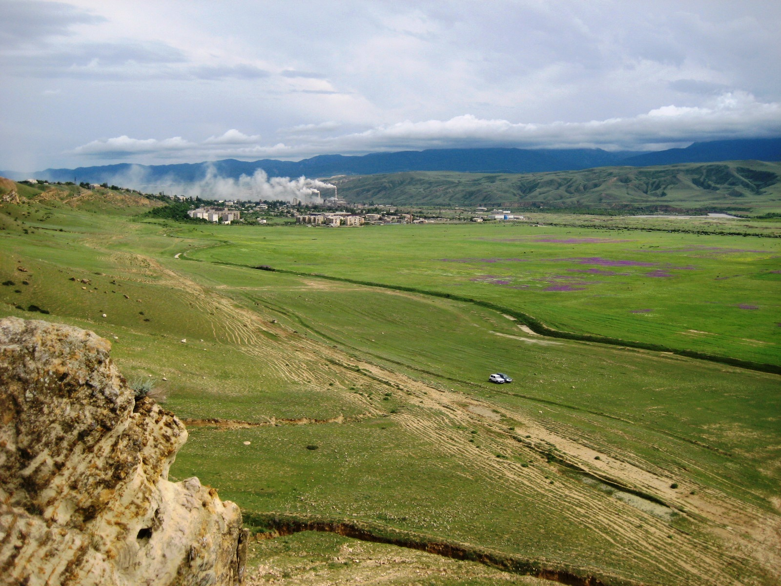 კასპი